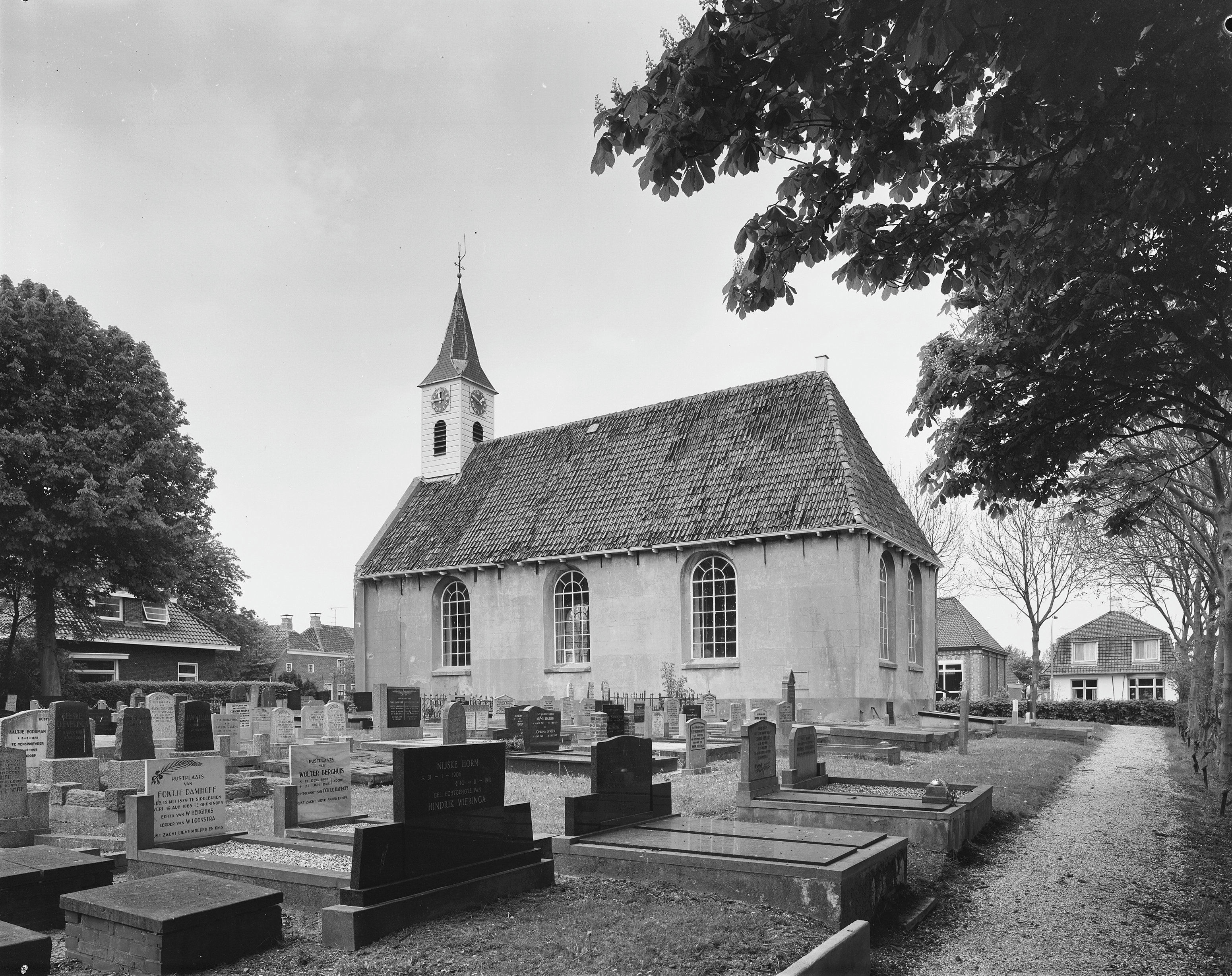 Nederlands Hervormde Kerk: zuidzijde